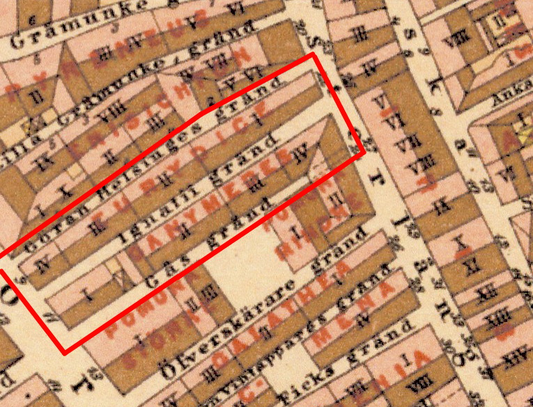 Lundgrens karta över Gamla Stan 1885 med kvarteren Eurydice och Ganymedes